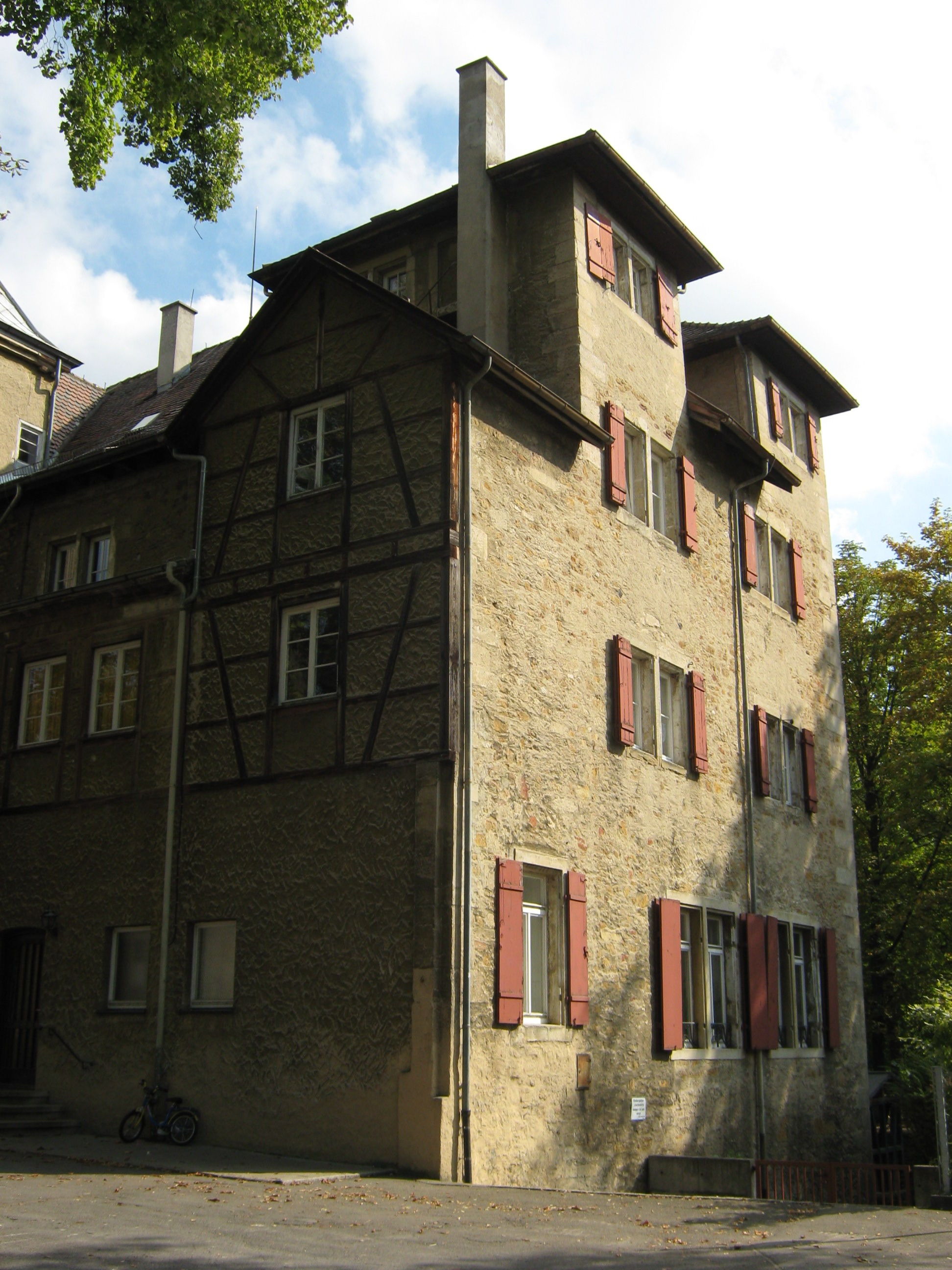 Das Jagdschloss im Stil der Renaissance wurde 1560-1565 von Herzog Christoph von Württemberg unter der fachlichen Leitung von Aberlin Tretsch in Pfullingen erbaut und ersetzte eine Wasserburg an der Echaz von 1260. Das ehemalige herzoglich-württembergische Schloß fungierte 1844-1920 als Heil- und Pflegeanstalt für psychisch Kranke. Inzwischen gehören zu den Nutzern städtische Einrichtungen, die Volkshochschule und mehrere Vereine.